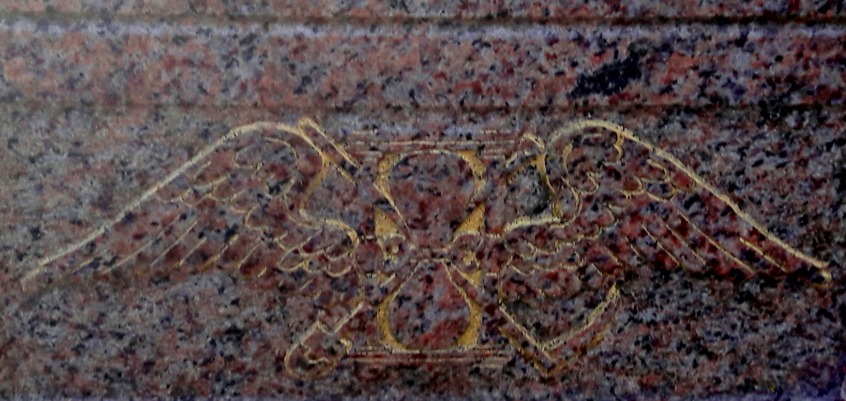 Leono Jurgio Jodkovskio antkapio detalė Vilniaus Bernardinų kapinėse